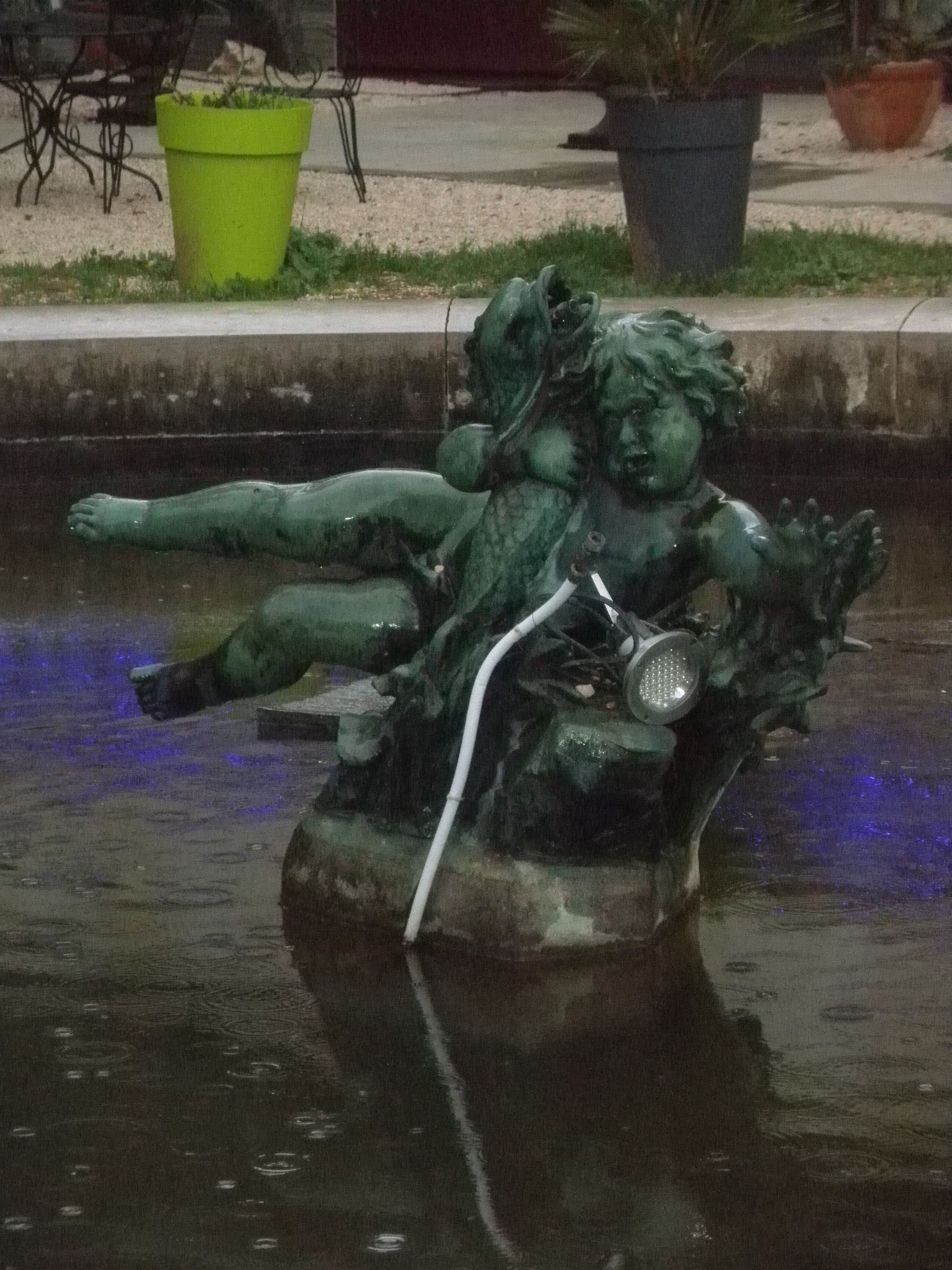 La rouvière en 2014